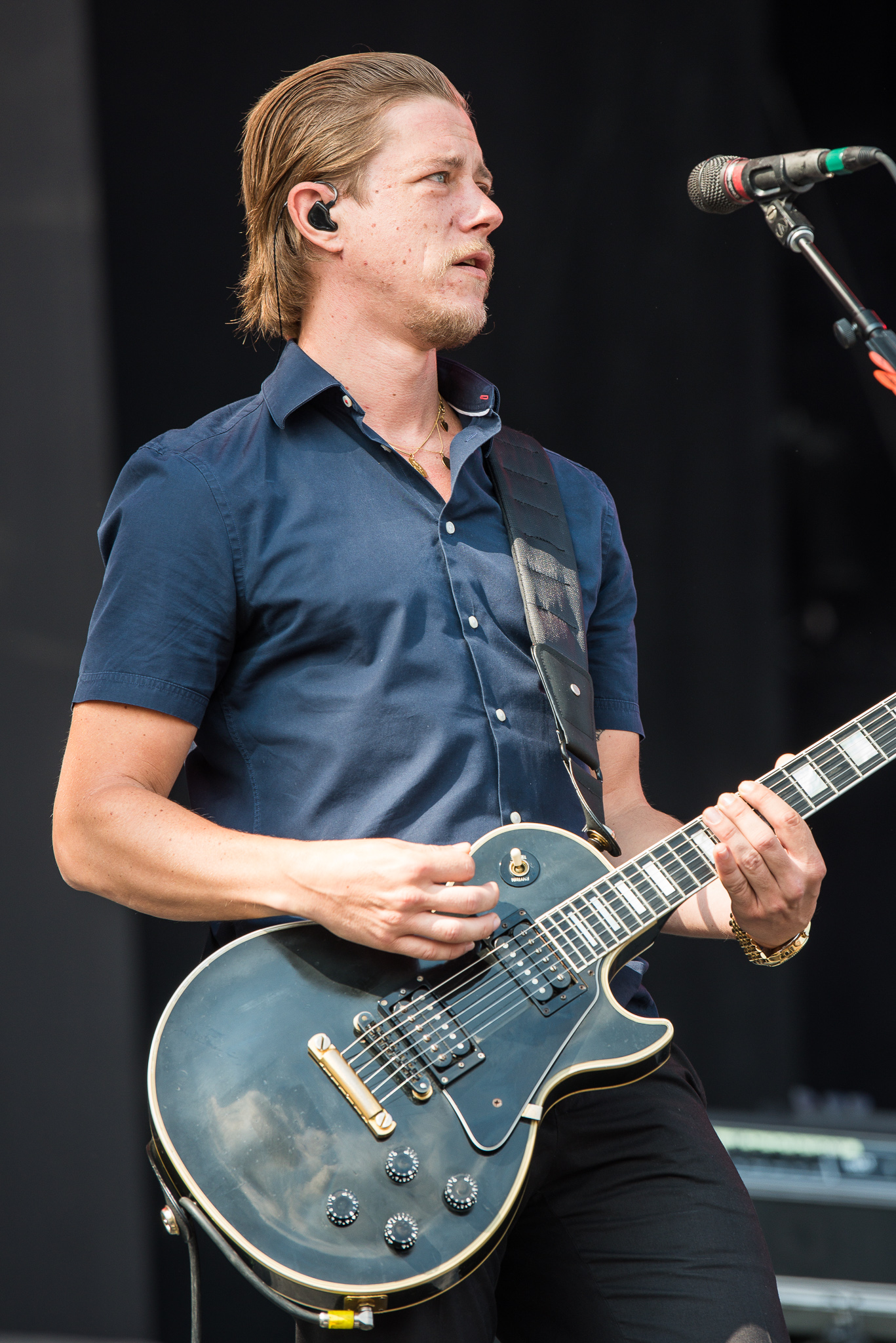 ARGO-Konzerte,Festival,Interpol,Konzert,Livekonzert,Livemusik,Musik,Paul Banks,RiP,Rock im Park 2015,Seat Zeppelin Stage